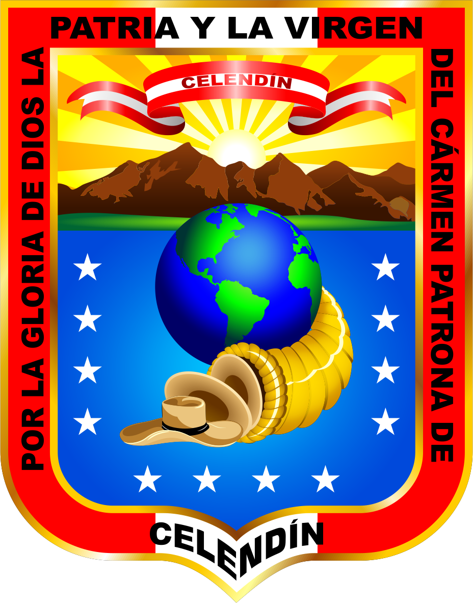 Significado: -Doce estrellas: cada una de ellas representa a cada uno de sus distrito. -Cornucopia: de la cual salen sombreros, hace figura a la producción de sombreros de paja toquilla. Autor : Wilder Pereyra Horna